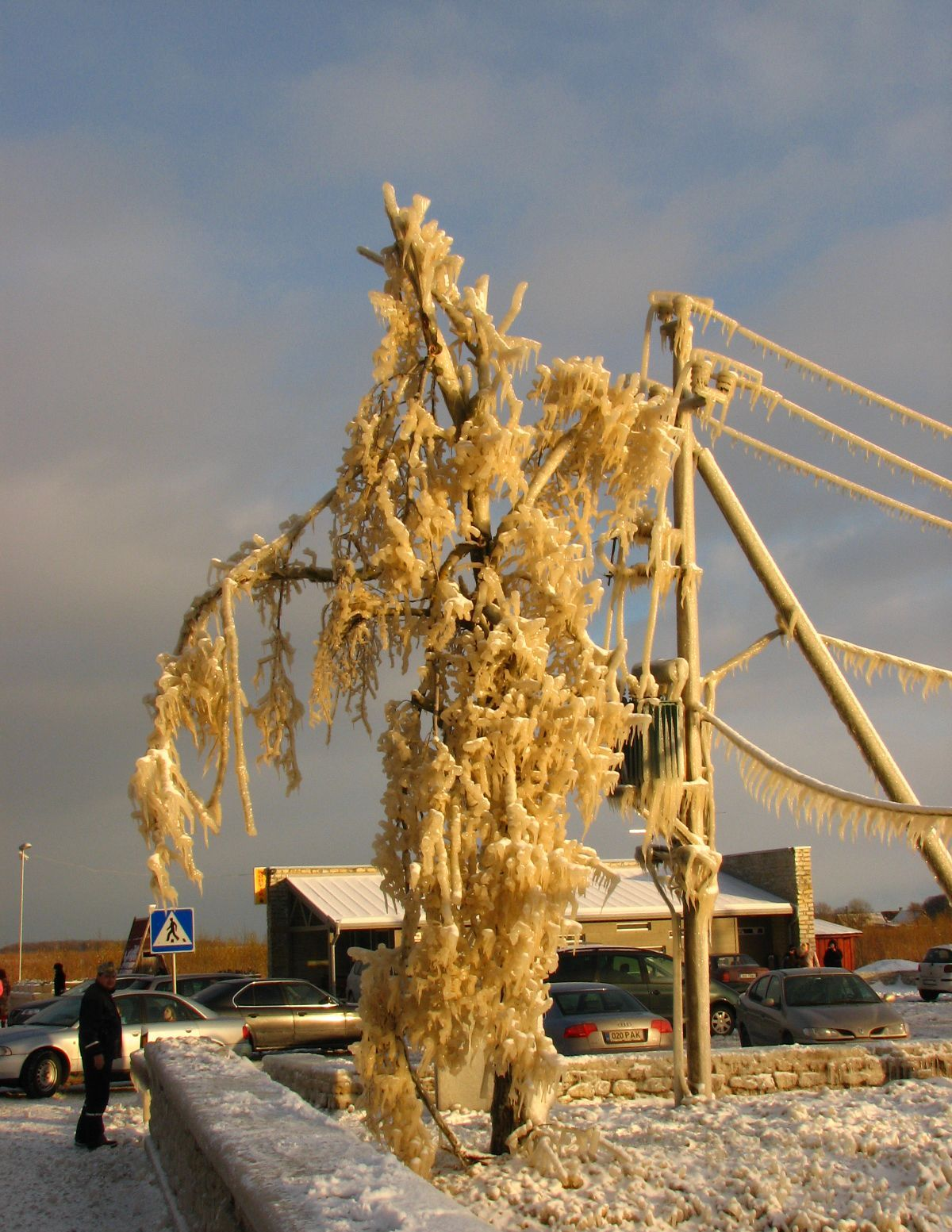 Сосульки на проводах и деревьях